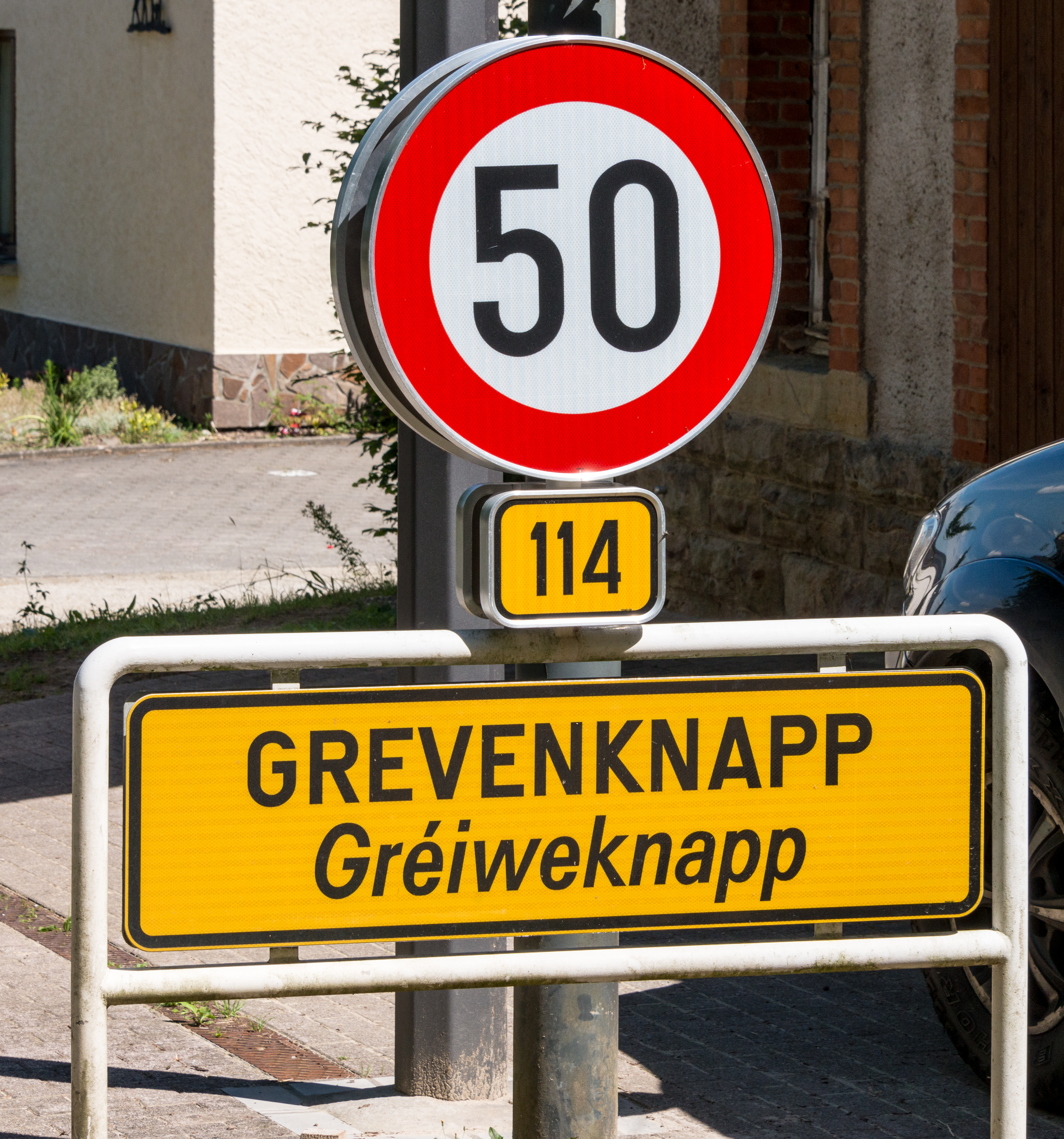 Uertsschëld zu Gréiweknapp.